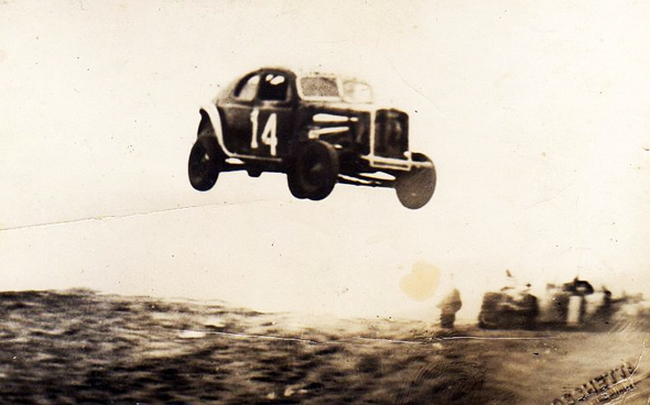 Salto de Ricardo Risatti I en el Gran Premio Internacional de 1938, a bordo de un Ford V8.